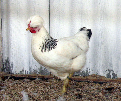 Чубатая 2